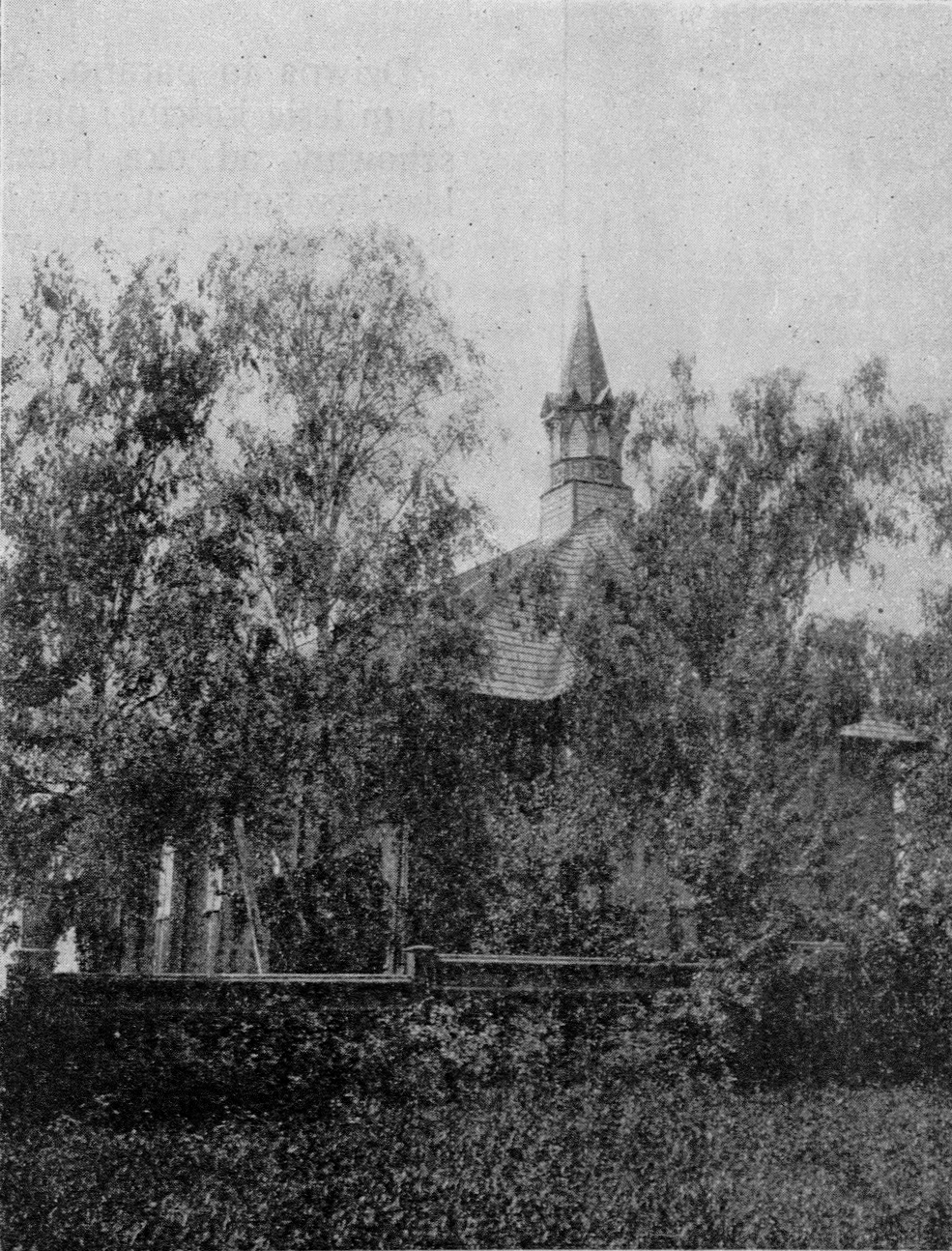 Беларуская (тарашкевіца): Каралішчавічы (Karališčavičy). Касьцёл Апекі Маці Божай